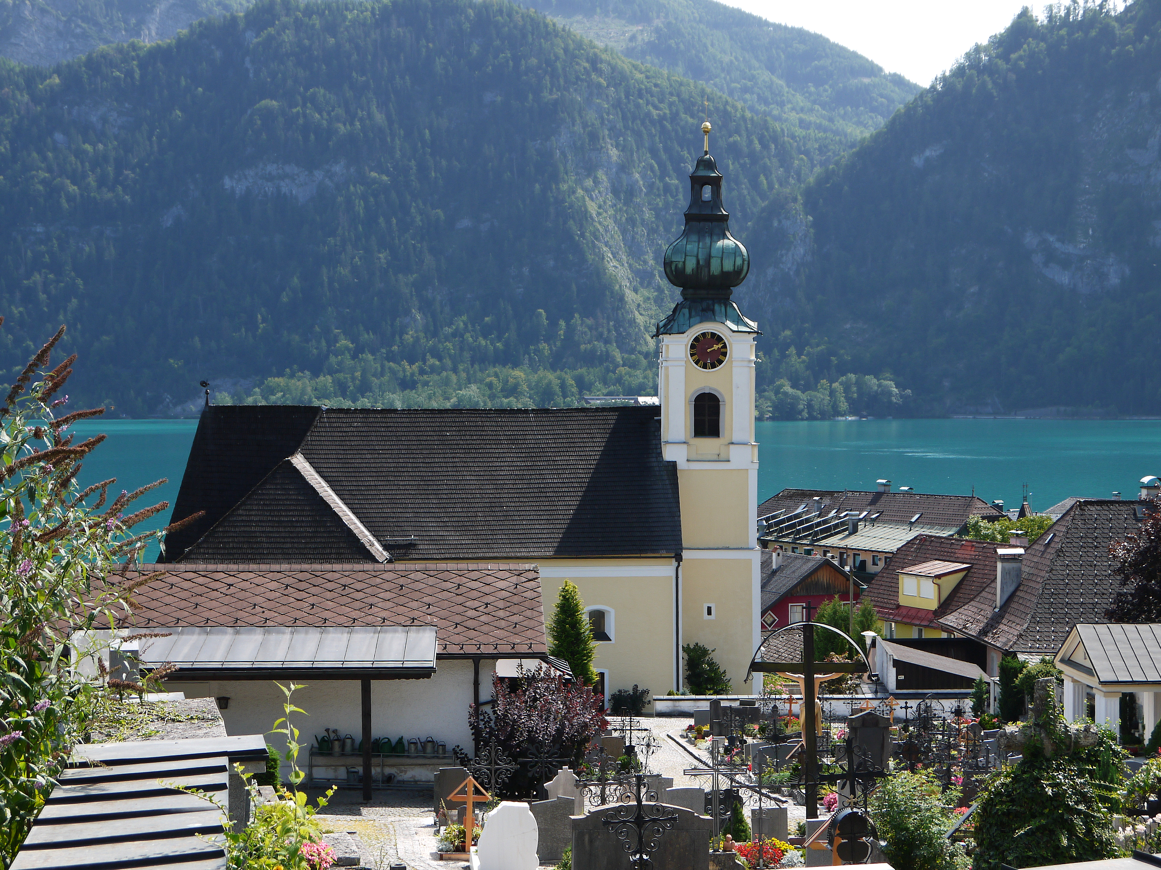 Kath. Pfarrkirche hl. Bartholomäus und ehem. Friedhofsfläche